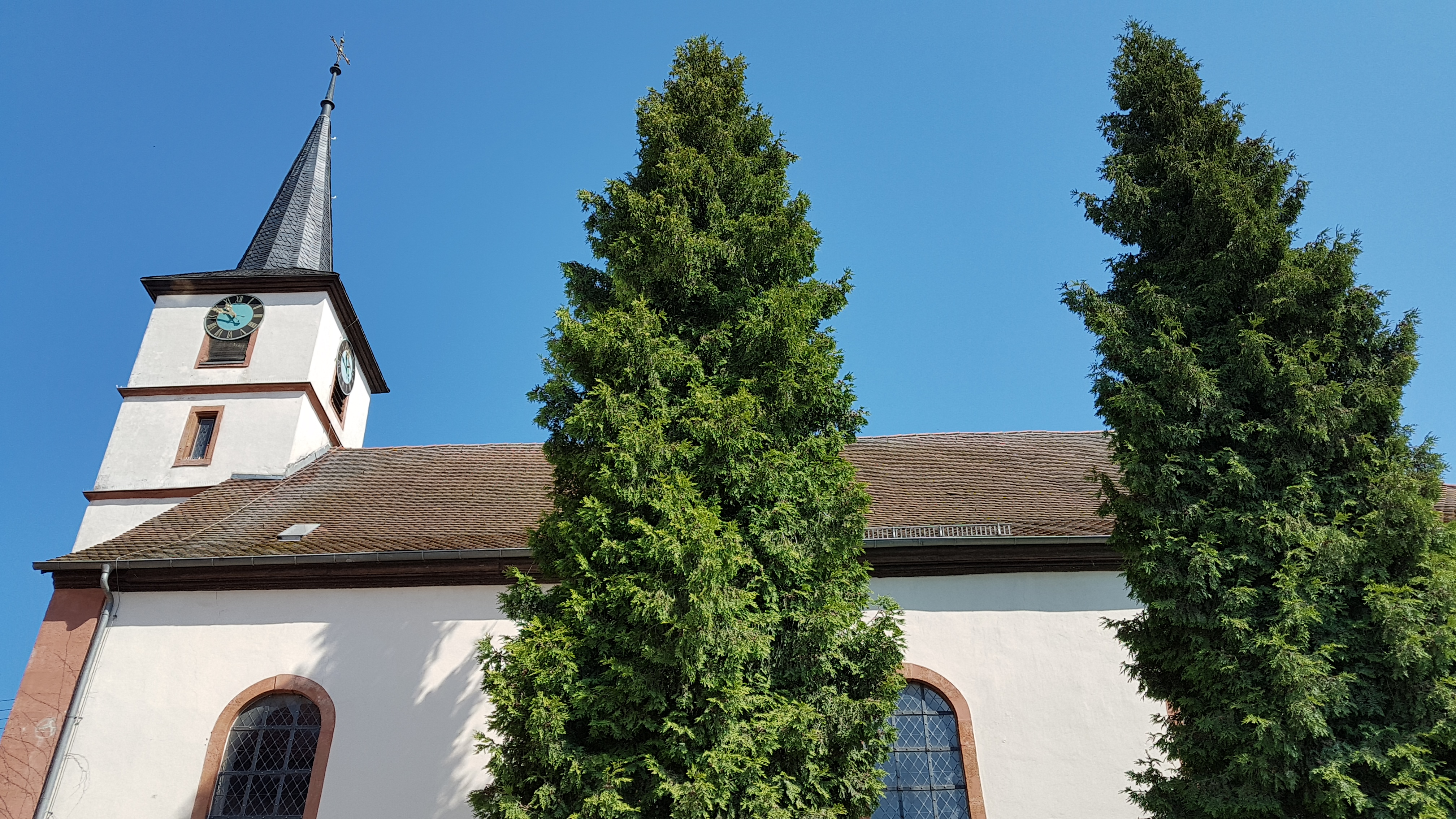 Evangelische Kirche Schweigern, Marktstraße 41, 97944 Boxberg-Schweigern